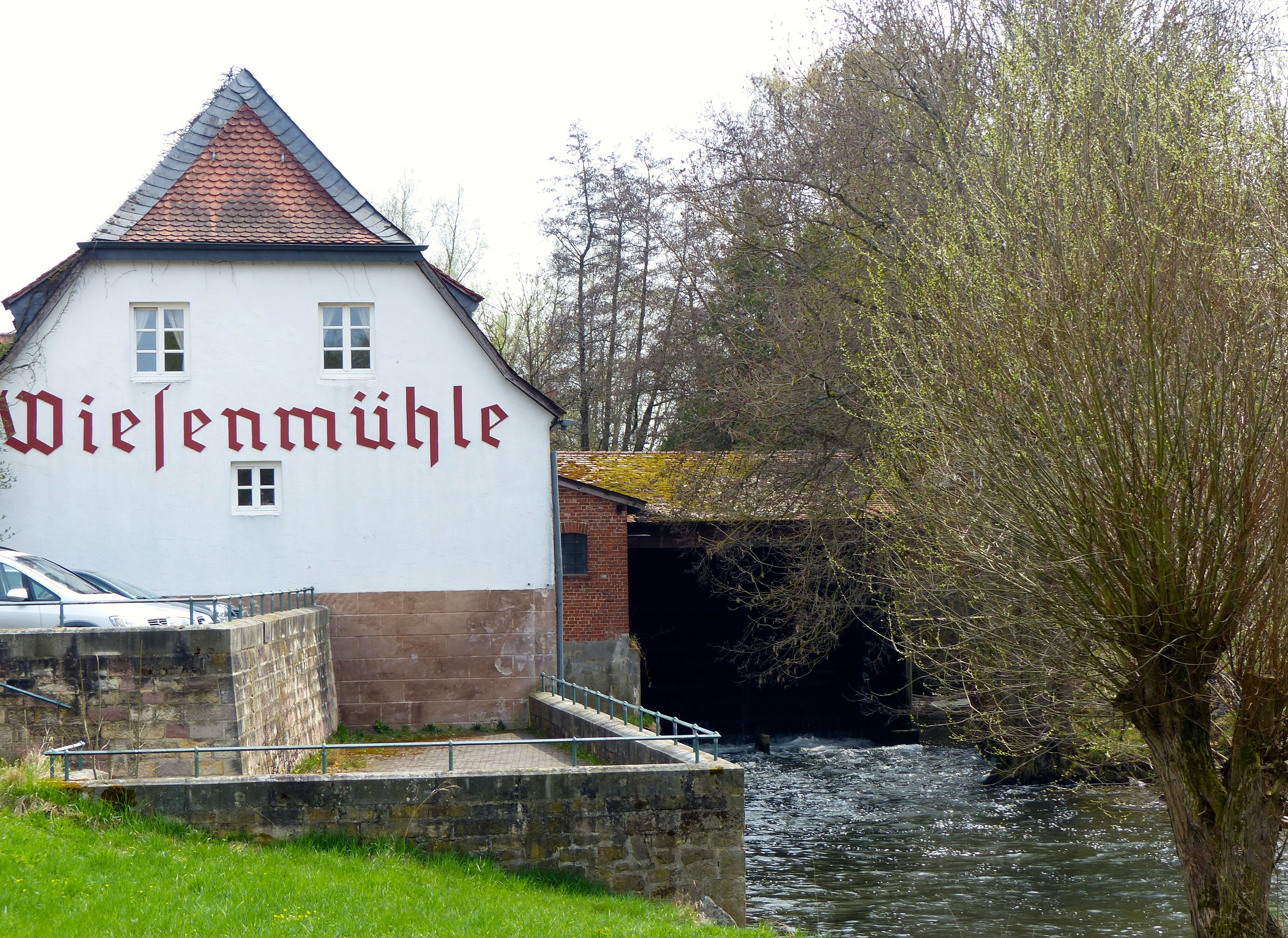 Wiesenmühle an der Fulda mit Mühlrad